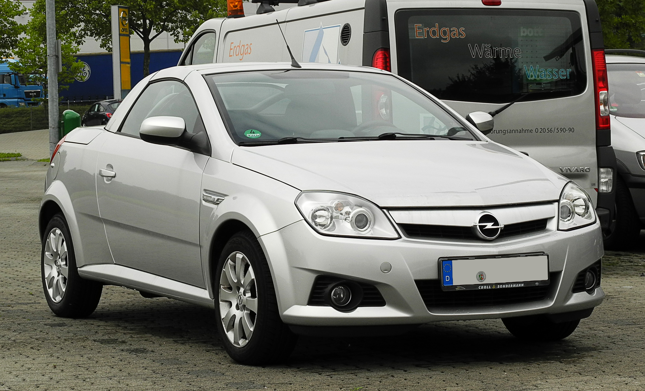 Opel Tigra TwinTop